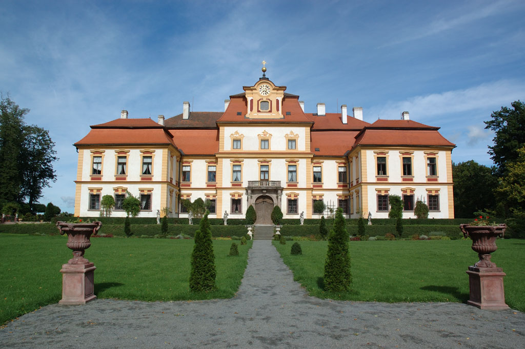 Schlossansicht vom Garten aus